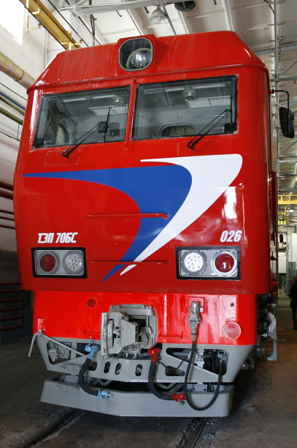 Пассажирский тепловоз ТЭП70БС-026 Тепловоз в цеху Коломенского завода